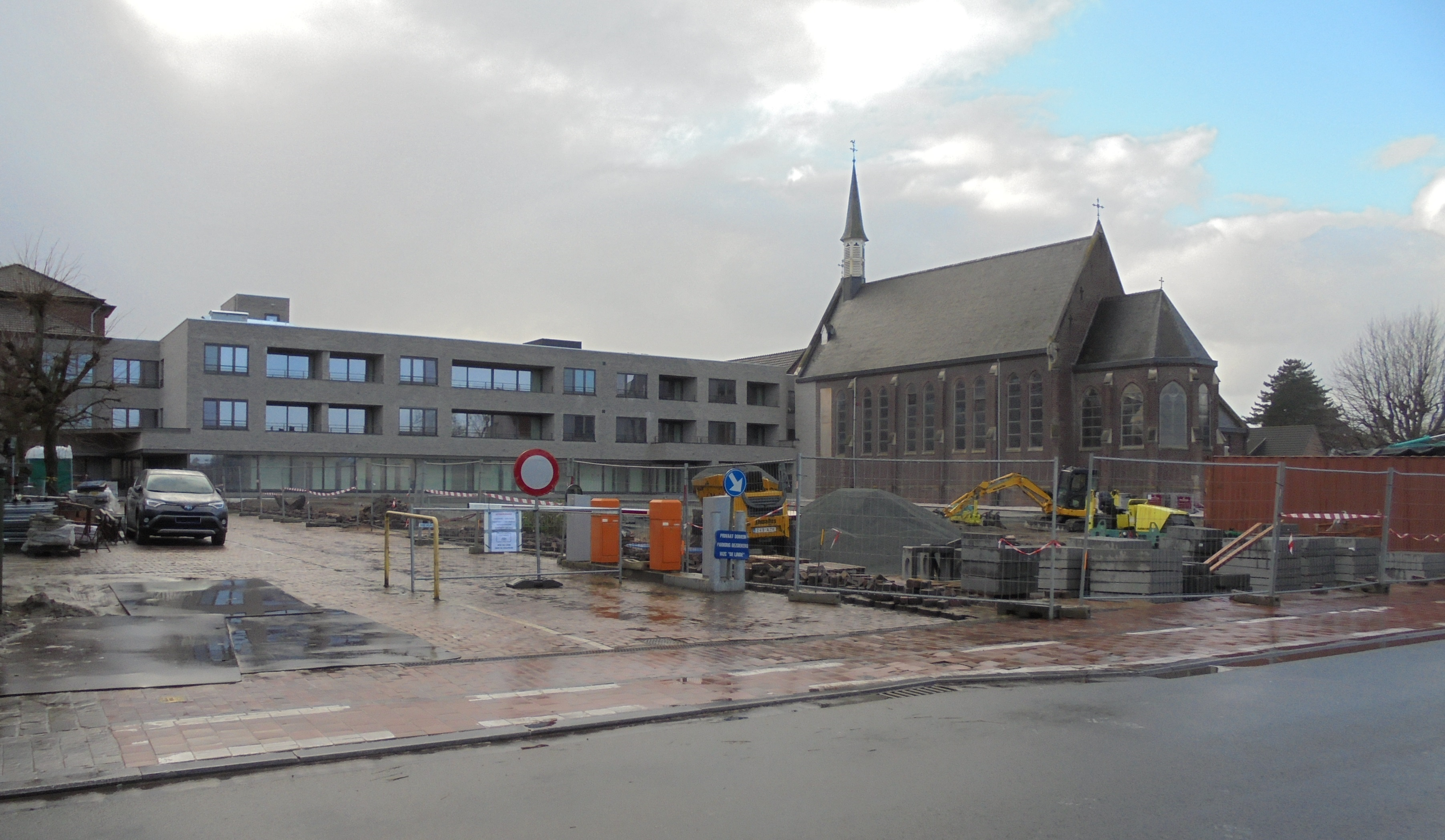 Kapel (1868) van het voormalig Klooster - Schoolstraat - Waarschoot - Lievegem - Oost-Vlaanderen - België.